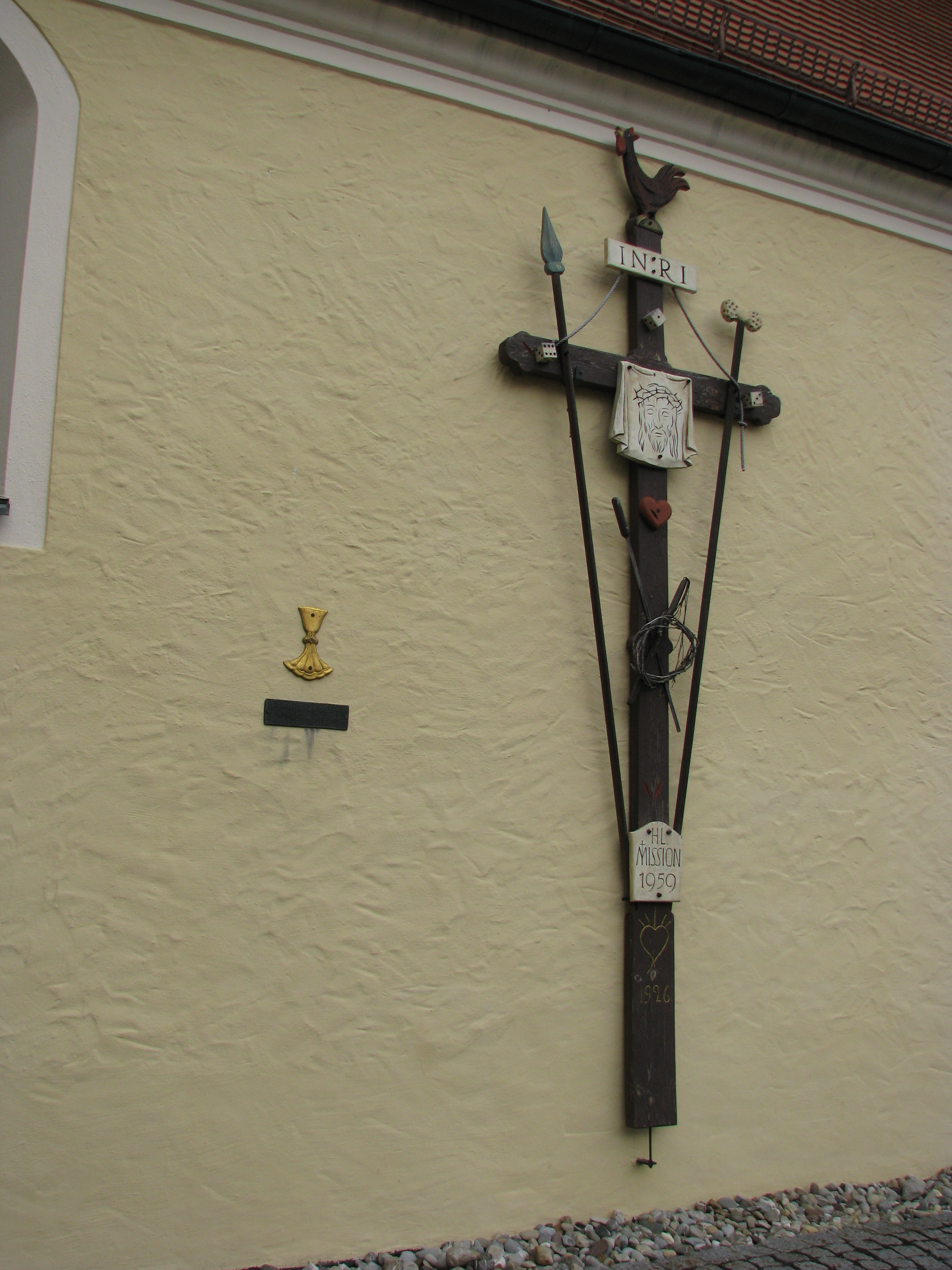 Landerzhofen, Ortsteil von Greding im Landkreis Roth, Filialkirche St. Thomas, Arma Christi-Kreuz